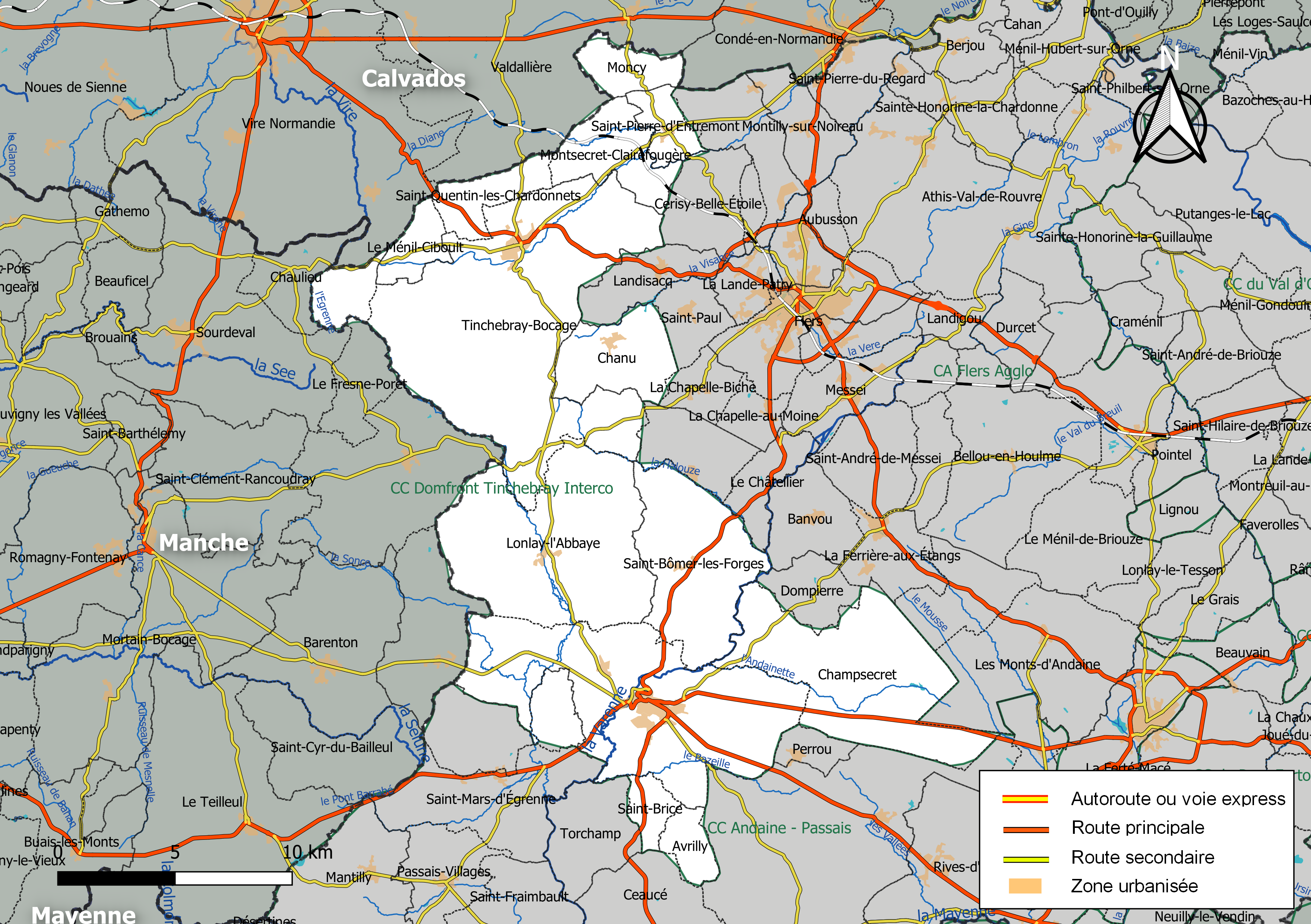 Carte géographique de la Communauté de communes Domfront Tinchebray Interco, département de l'Orne, France. Composition au 1er janvier 2019.